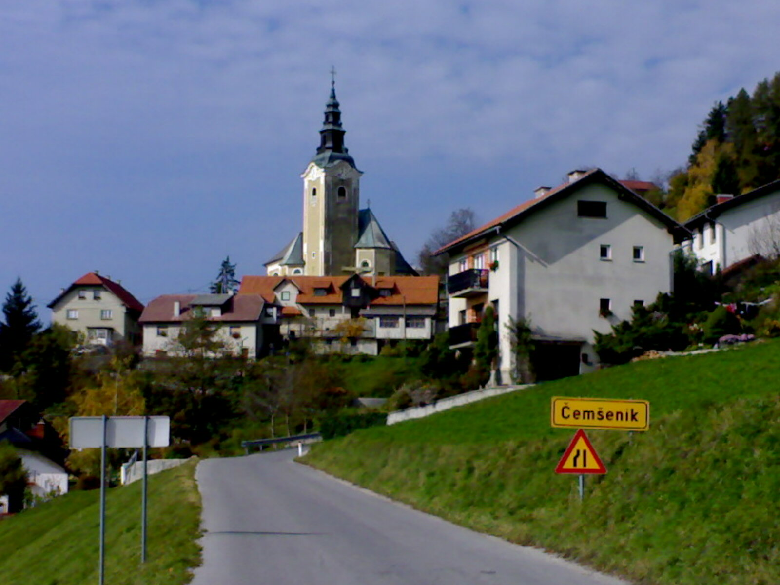 Cesta skozi Čemšenik, s cerkvijo Marijinega vnebovzetja.